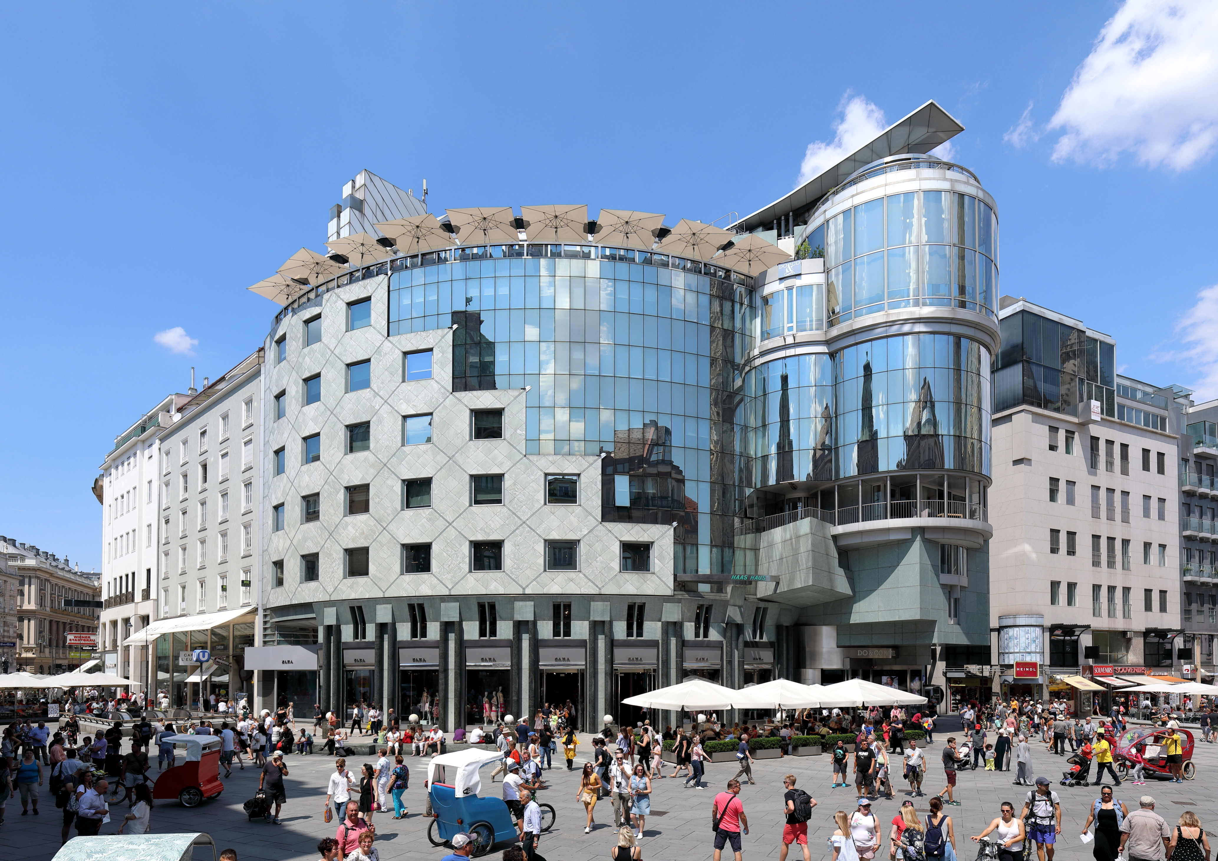 Das Haas-Haus an der Adresse Stock-im-Eisen-Platz 4 (Goldschmiedgasse 1 / Graben 32 / Stephansplatz 12) im 1. Wiener Gemeindebezirk Innere Stadt.Das 1. Haus wurde von 1865 bis 1867 als Warenhaus "Philipp Haas & Söhne" errichtet, im II. WK zerstört und dann abgetragen. Das 2. Haas-Haus wurde von 1951 bis 1953 nach Plänen von Max Fellerer und Carl Appel errichtet und trotz Protesten 1986 abgetragen. Das 3. Haas-Haus, auch als Hollein-Haus bezeichnet, ließen die damaligen Eigentümer (Zentralsparkasse und Kommerzialbank AG sowie Wiener Städtische Wechselseitige Versicherung) trotz heftigen Protesten und Bürgerinitiativen nach Plänen des Architekten Hans Hollein errichten. Die Grundsteinlegung fand im Herbst 1987, die Gleichenfeier am 2. September 1988 und die Eröffnung am 15. September 1990 statt.